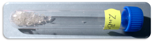 Bromid zinečnaý - ZnBr2